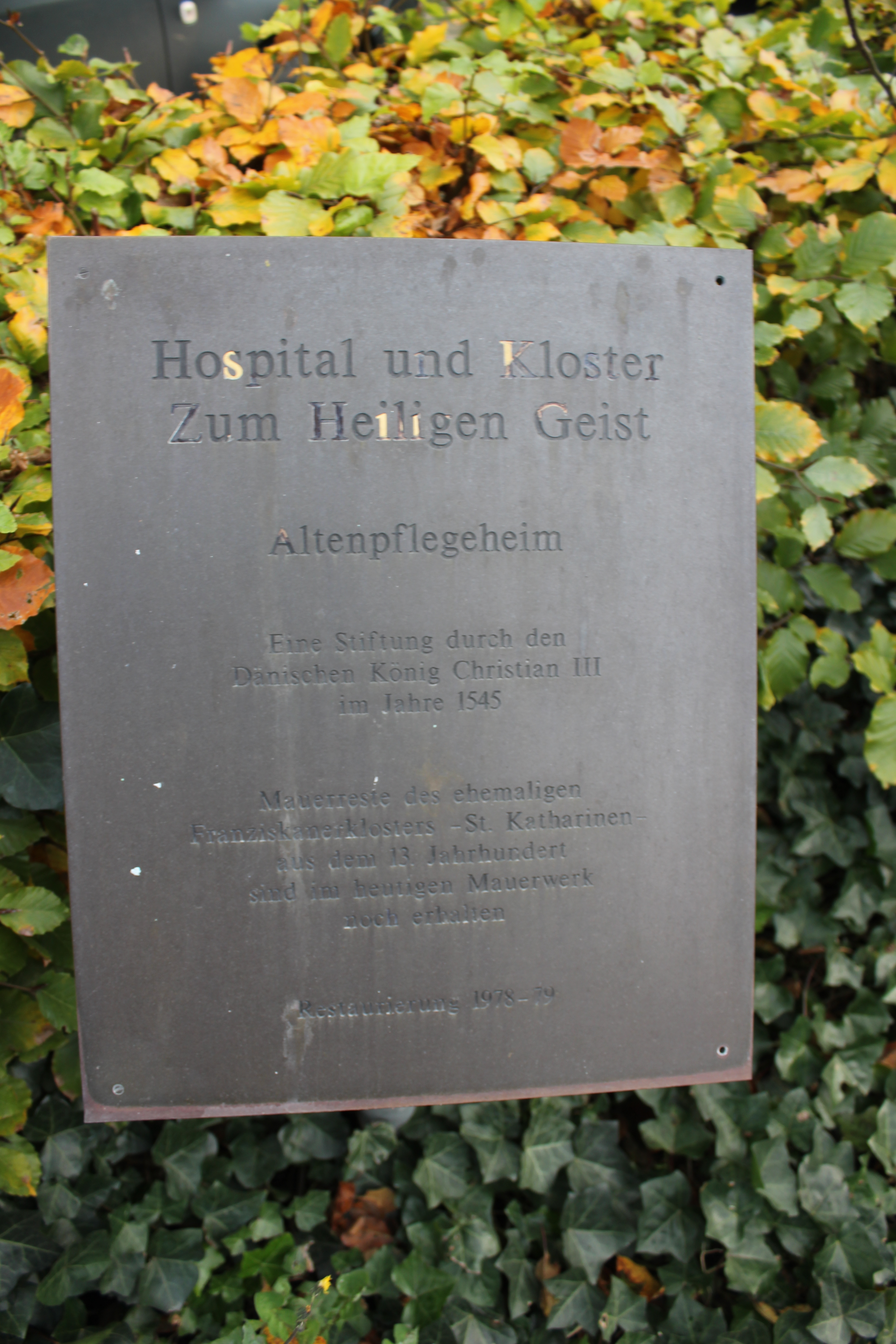 Franziskanerkloster Flensburg, Gedenkschild, Bild 1